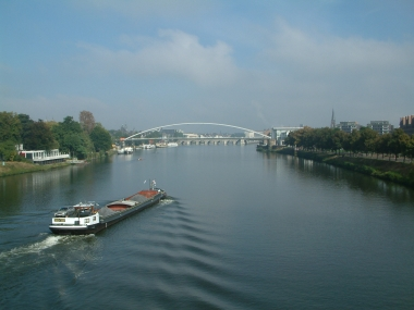 Maas bij Maastricht (eigen foto)